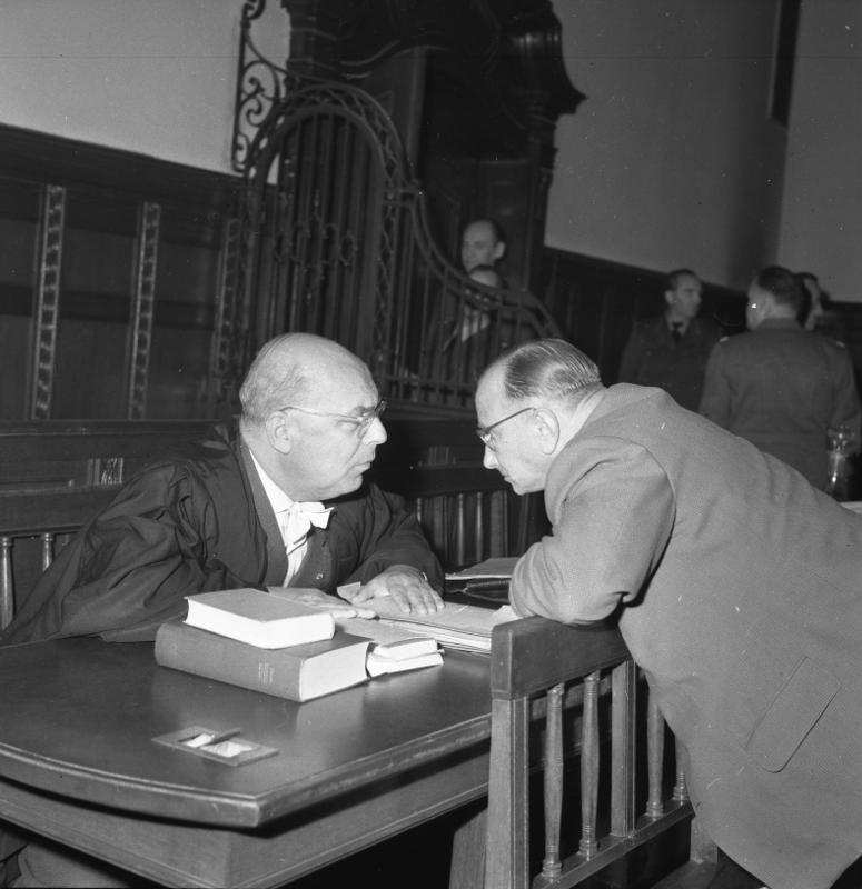 Berlin, Friedrich Karl Kaul, Albert Grohmann Zentralbild, Schneider, 21.10.1960, "Wahrheit"-Redakteur in Westberlin verurteilt Ein schwerer Anschlag gegen die Presse- und Meinungsfreiheit in Westberlin unter Berufung auf Besatzungsrecht wurde am 21.10.1960 vom Amtsgericht Tiergarten mit der Verurteilung des "Wahrheit"-Redakteurs Albert Grohmann zu zwei Monaten Gefängnis verübt. Verteidiger Professor Dr. Kaul kündigte sofort an, er werde im Auftrag seines Mandanten Berufung einlegen. (Siehe ADN-Meldung Nr.147/417 vom 21.10.1960) UBz: Albert Grohmann (rechts) mit seinem Verteidiger Prof. Dr. [Friedrich Karl] Kaul. Abgebildete Personen: Kaul, Friedrich Karl Prof. Dr.: Rechtsanwalt, Schriftsteller, Vaterländischer Verdienstorden (VVO) in Silber 1956, DDR (PND 104358491) Grohmann, Albert: Redakteur der Zeitung Die Wahrheit, Bundesrepublik Deutschland